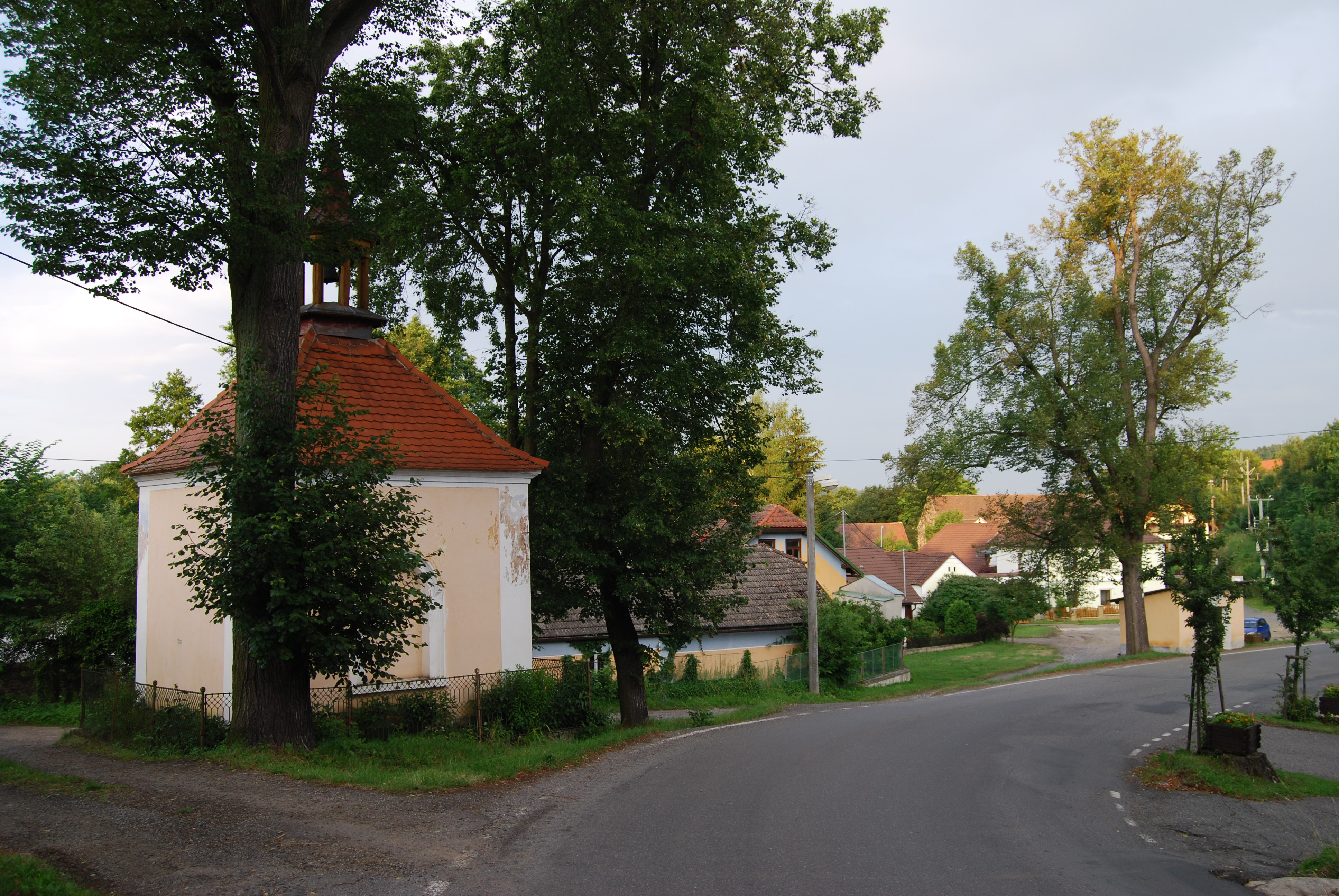 Kaple na návsi ve vesnici. Krašovice (Krásná Hora nad Vltavou). Okres Příbram. Česká republika. - Google Maps - Google Earth